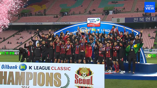 FC서울의 K리그 클래식 2016 우승 세레모니